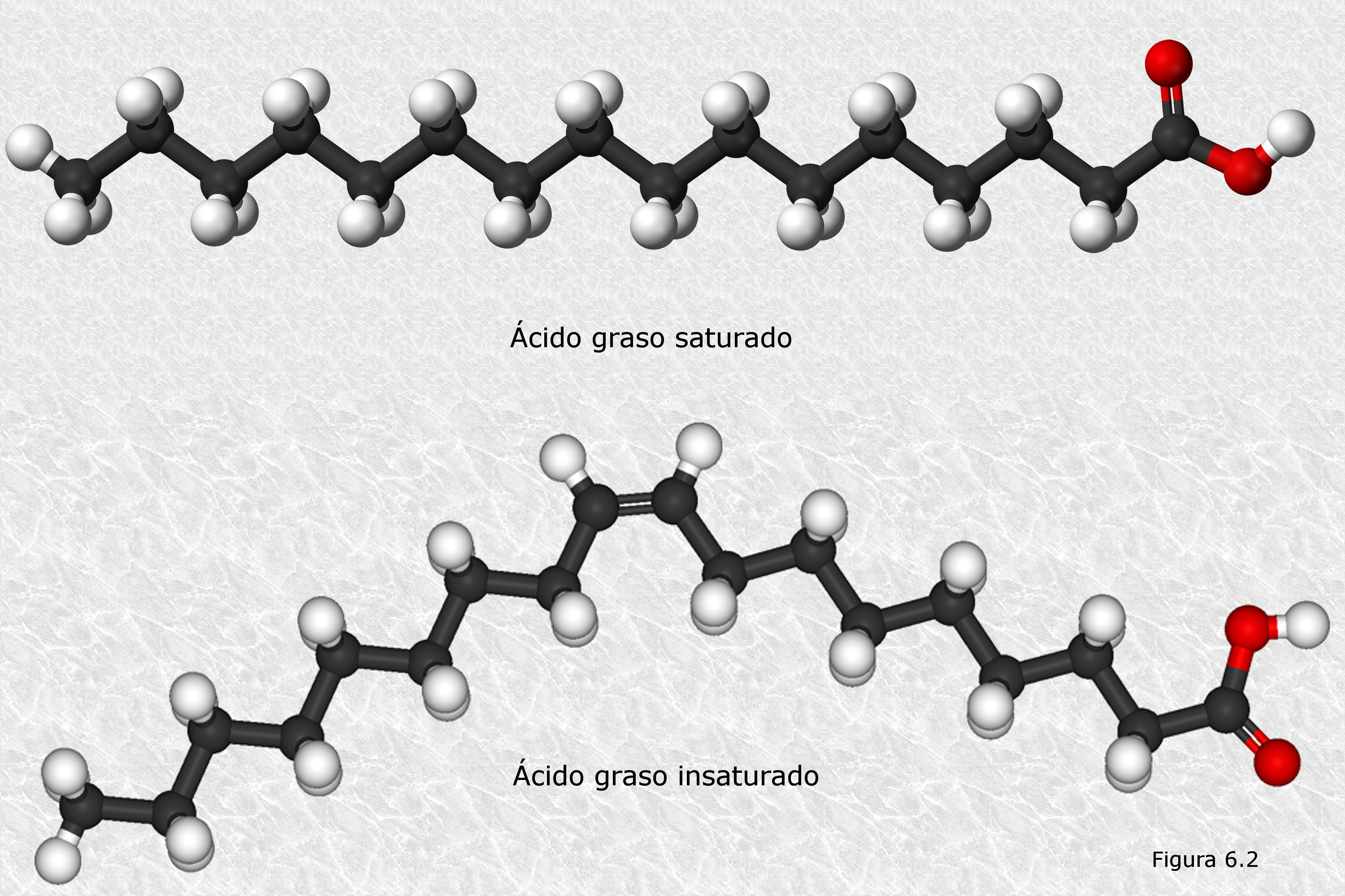 Ácidos grasos saturados e insaturados